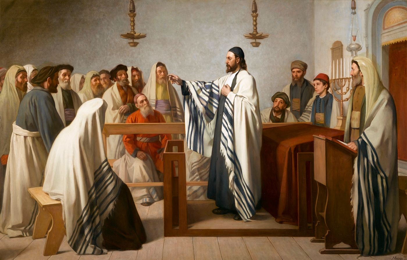 Sermon dans un oratoire israélite, 1897. Huile sur toile.